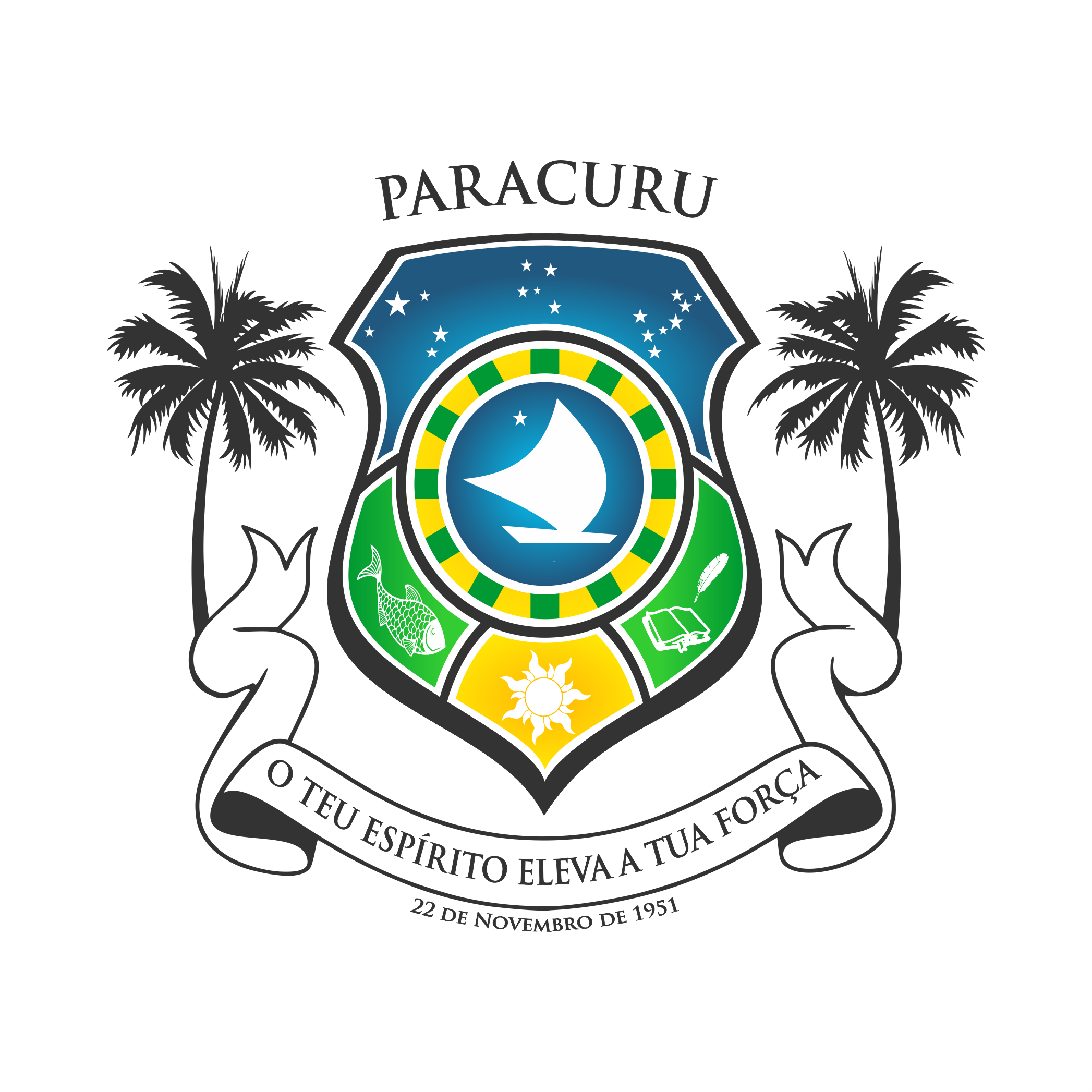 A Prefeitura Municipal de Paracuru e suas Secretarias, seguindo a Lei Municipal nº. 1.817/2018, passa a utilizar como logotipo o Brasão Municipal de Paracuru, apresentado neste instrumento. Sancionado pelo Prefeito Eliabe Albuquerque, em 09 de março do corrente, apontado pelo projeto de Lei Legislativo nº. 04/2018, de autoria da Vereadora Rachel do Noca e arte do designer Thames Cagliari, deu-se partida a criação do novo simbolo municipal, com a seguinte interpretação: I) Céu Azul Estrelado – Guia para os pescadores nas pescarias em alto mar; II) Jangada Branca – Símbolo maior do município. E em branco simboliza a areia das praias e dunas de Paracuru; III) Estrela Solitária – Representa a fé dos pescadores em uma força maior que os protege; IV) Peixe – Simboliza o desenvolvimento inicial de Paracuru, cidade que surgiu a partir de uma vila de pescadores; V) Sol – Desenvolvimento turístico, cidade tropical de clima agradável e convidativo, Paracuru se faz bela com suas praias e dunas de areia branca, e sua gente hospitaleira; VI) Livro e Caneta Bico de Pena – Educação, desenvolvimento do futuro. Pois nada se dá sem educação de qualidade para a formação da sociedade futura. A parte inferior do brasão contem uma faixa, na qual consta a seguinte frase: "O teu espírito eleva a tua força" que representa as características da cidade e tendo como sua alma, o seu povo. O Brasão e a Bandeira são a dimensão visual de uma nação, de uma cidade. Este é mais um simbolo que representará a nossa terra e o nosso povo.